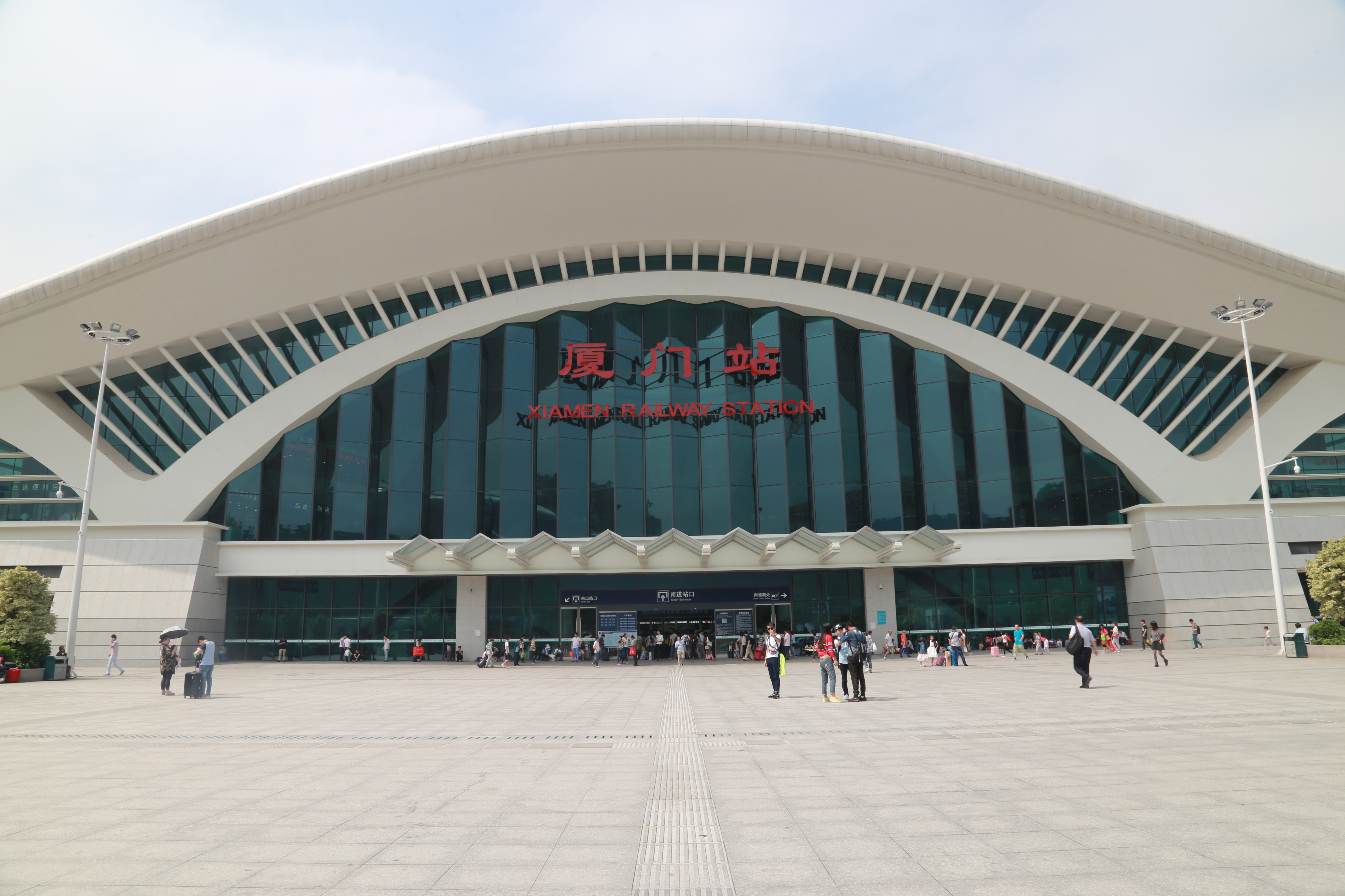 厦门站南广场2015-10-02 13:10:43